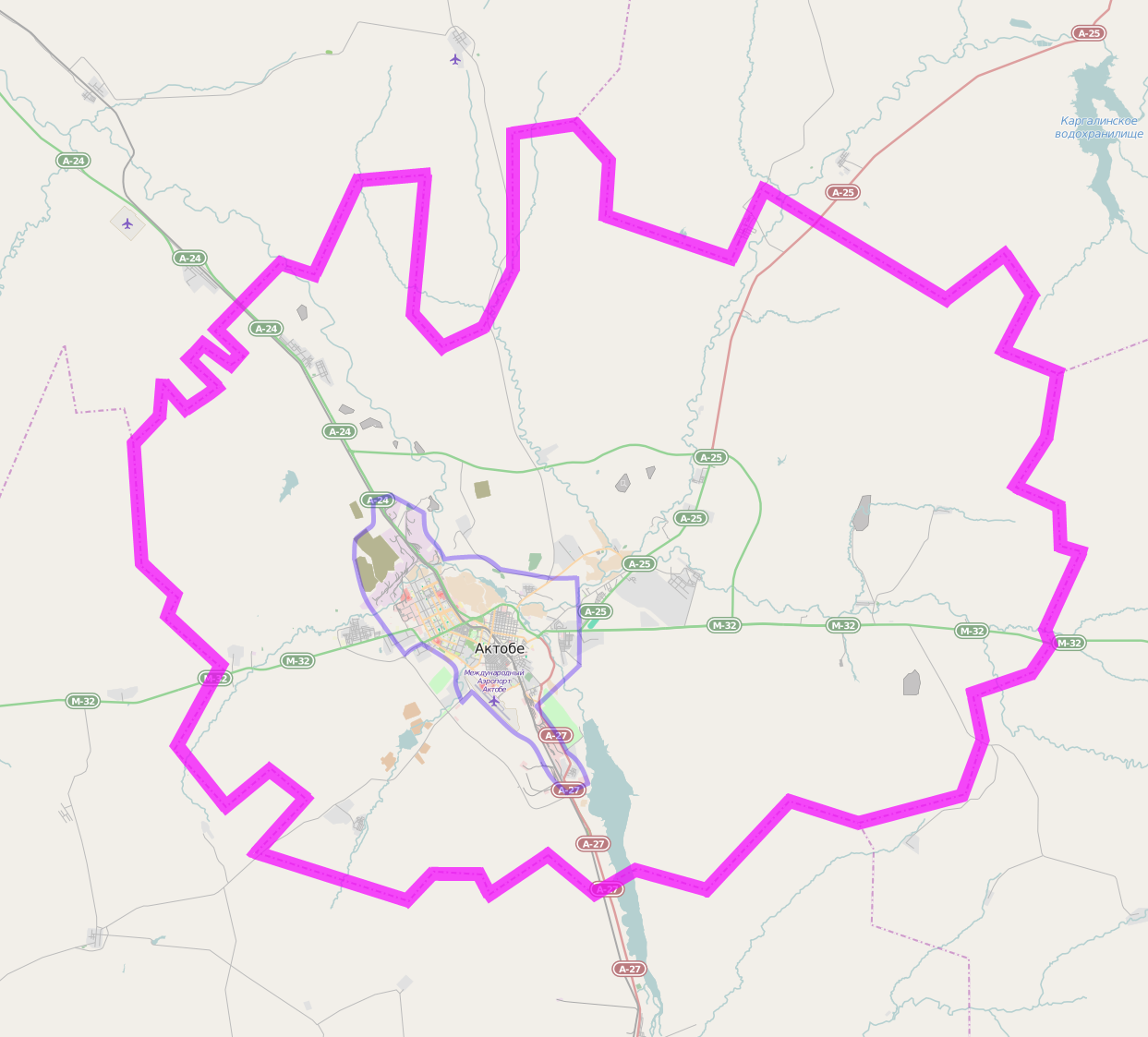 Примерная граница городской администрации Актобе и города Актобе на основе этой карты и карт OpenStreetMap.